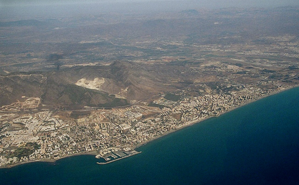 Torremolinos (rechts des Yachthafens) und Benalmádena (links des Hafens), gesehen von südwest. Manfred Werner (Benutzer:Tsui), September 2004